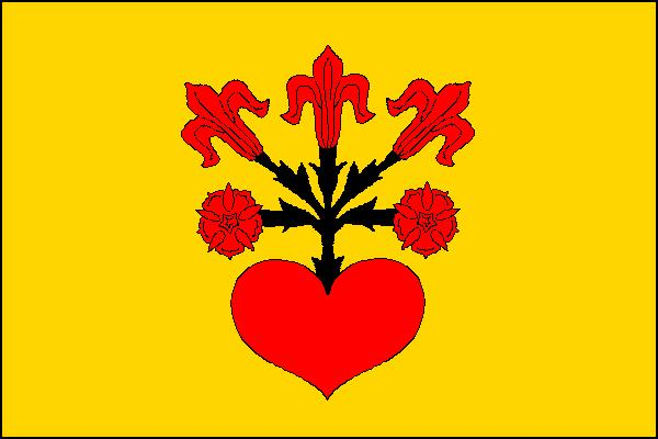 Vlajka obce Uhelná